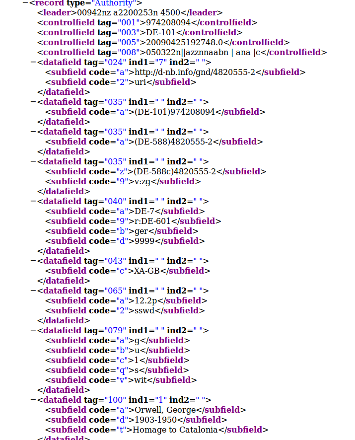 MARC-21-XML, Beispieldatensatz (Homage to Catalonia von George Orwell)